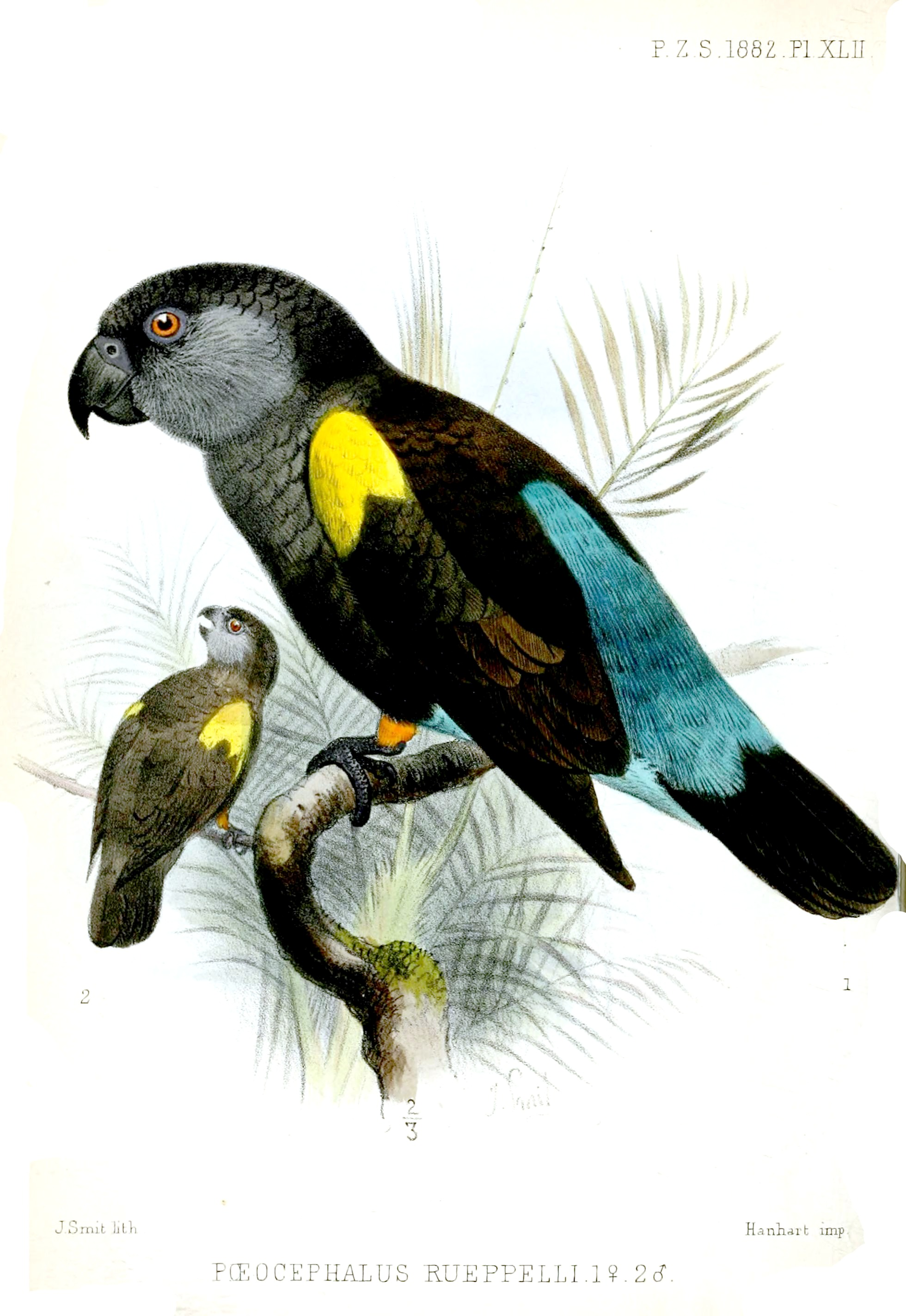 Poicephalus rueppelli